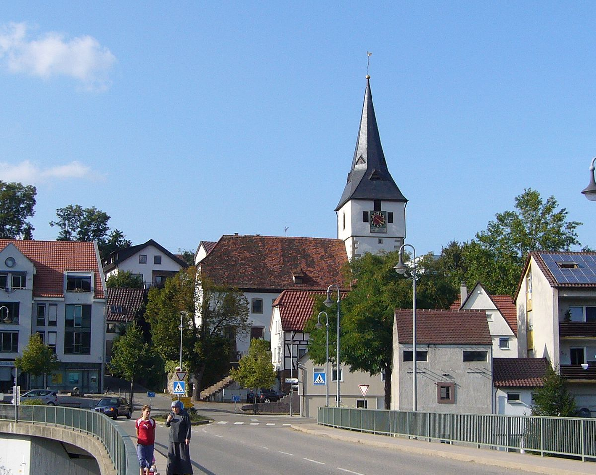 Die evangelische Kirche in Mühlacker-Lomersheim